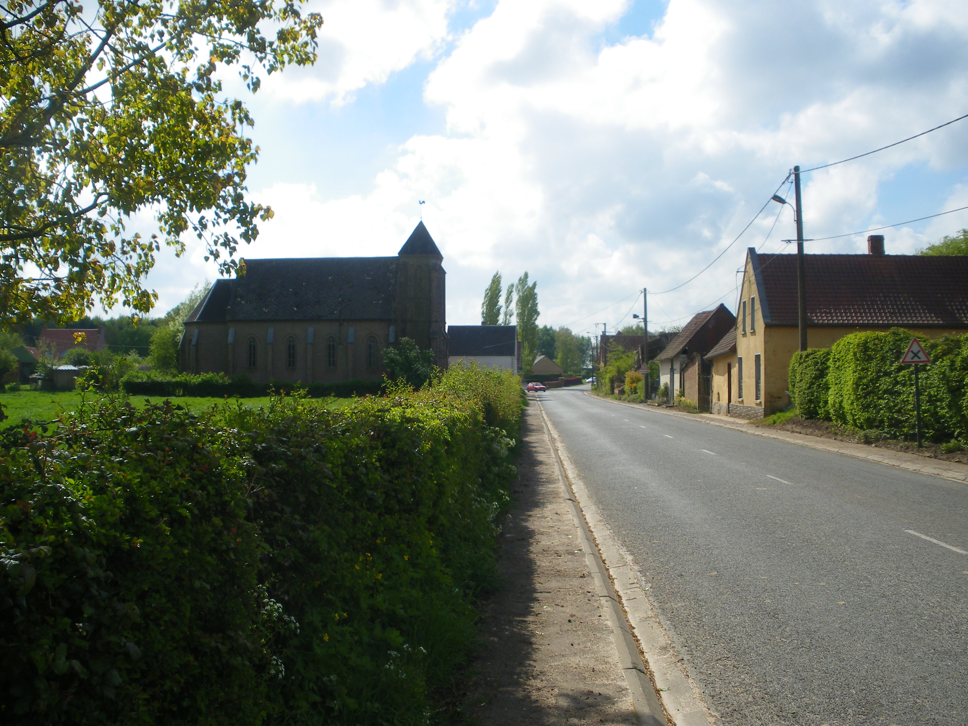 Vue de Beaudricourt, avec notamment l'église.